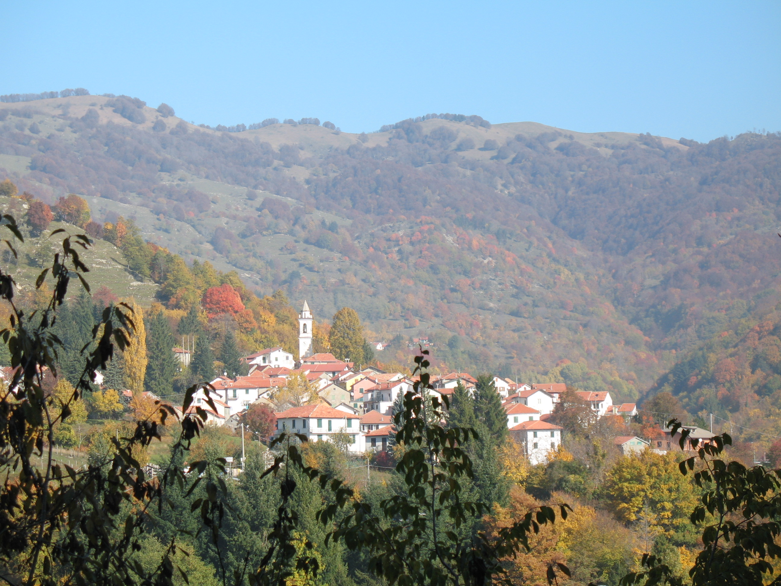 Panorama di Bavastrelli, frazione del comune di Propata, in Alta valle Trebbia, provincia di Genova, Liguria, Italia